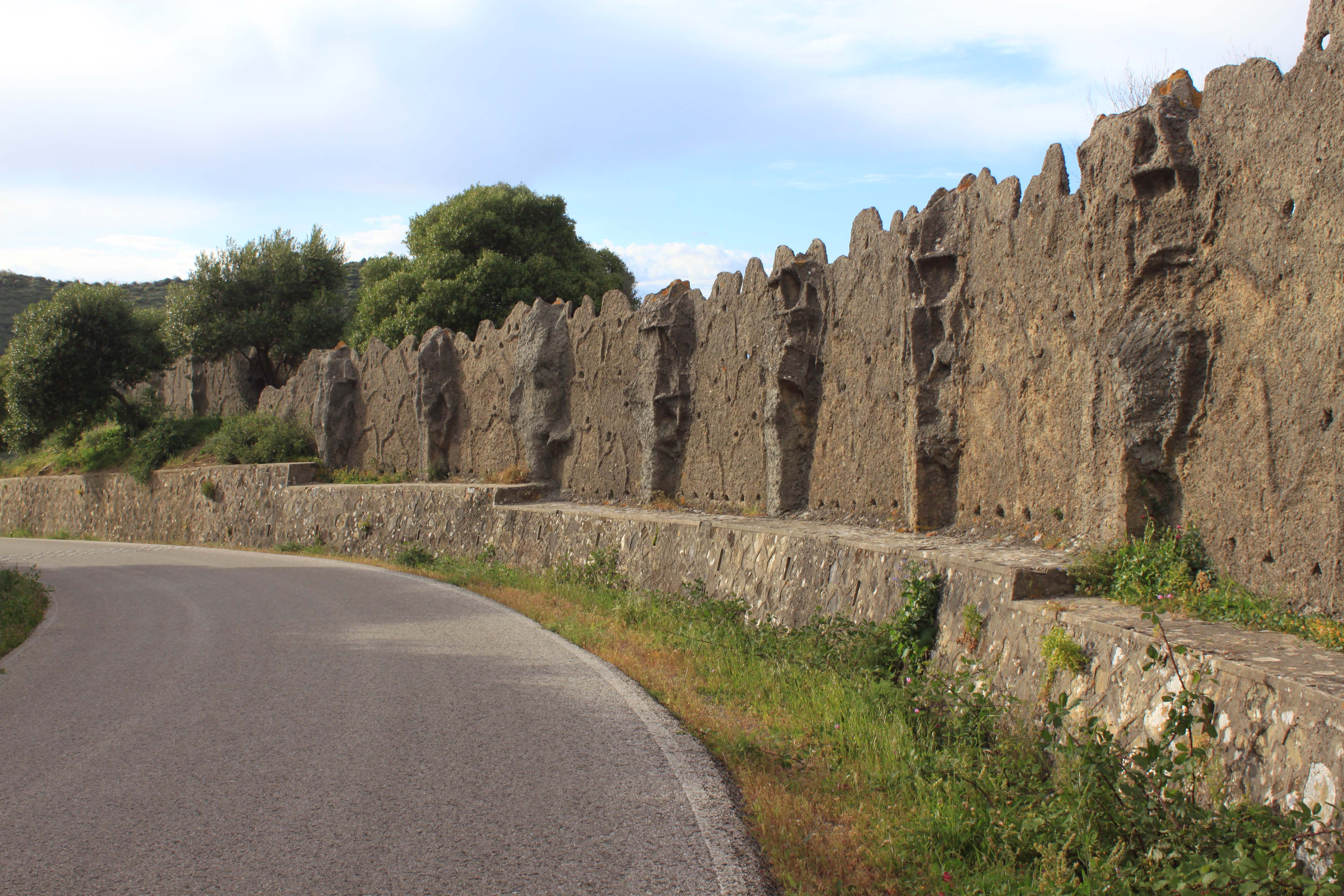 Carretera de Las Pantallas de Algeciras, España. Se muestran las estructuras construidas en 1942 en la pista militar Nº7 que comunica Algeciras con los cuarteles del Mando de Artillería de Costa (MACTA). La función de estas pantallas era el ocultar el paso de vehículos por la carretera a observadores desde la costa.